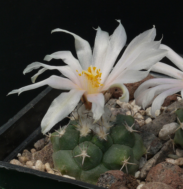 Turb. lophophoroides vor St. Domingo, S.L.P. in Blüte